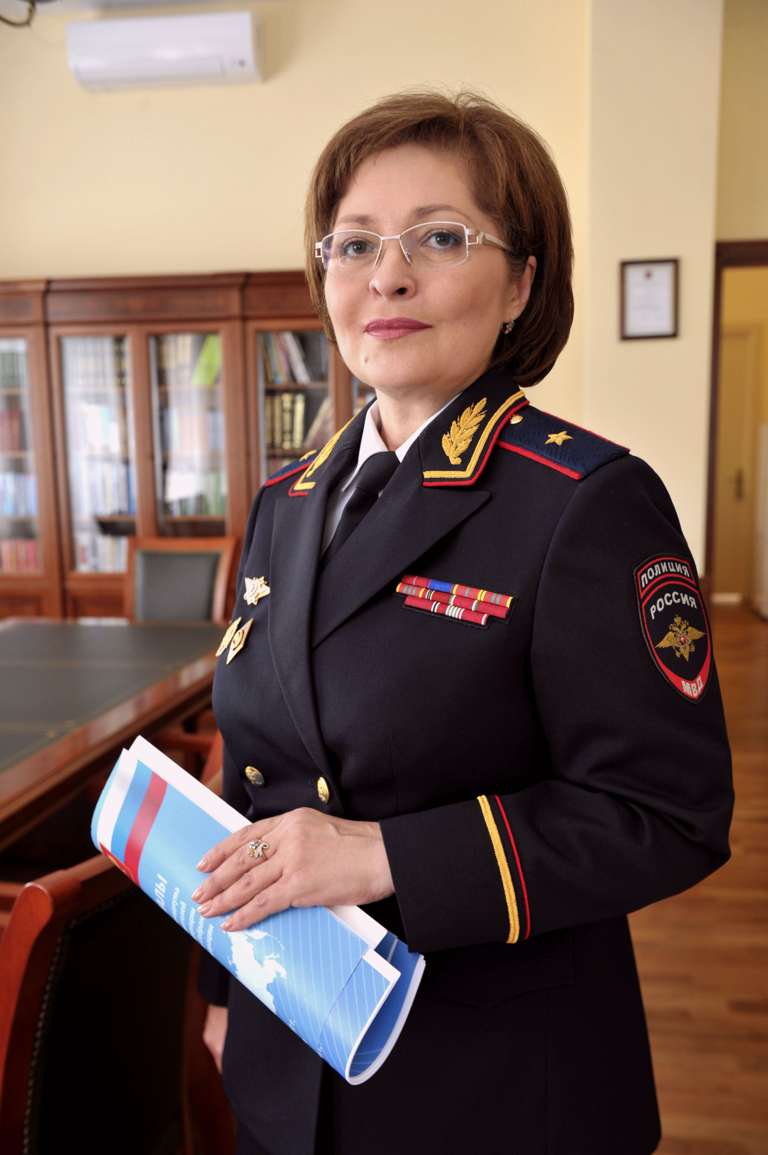 Начальник Главного управления по вопросам миграции МВД России генерал-майор полиции.